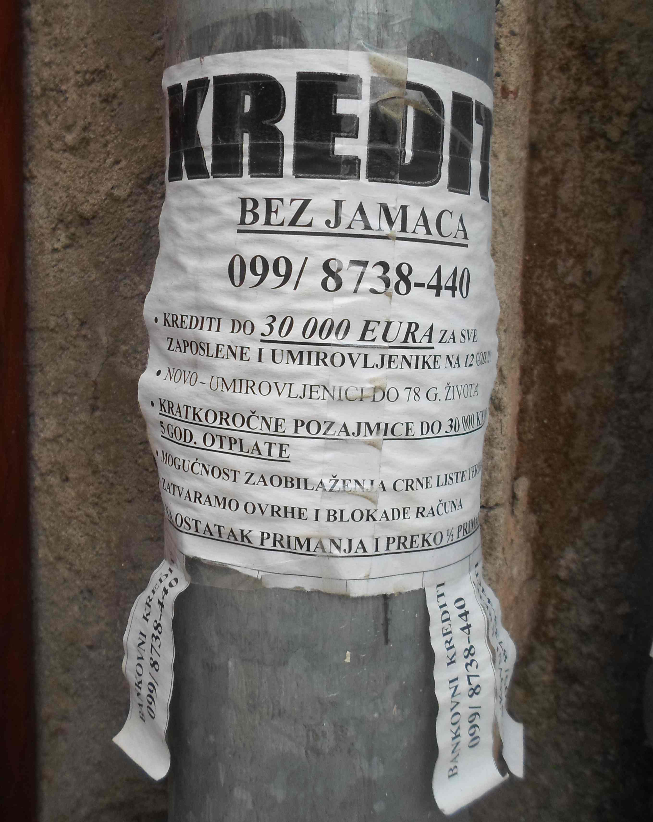 Lihvarski kredit